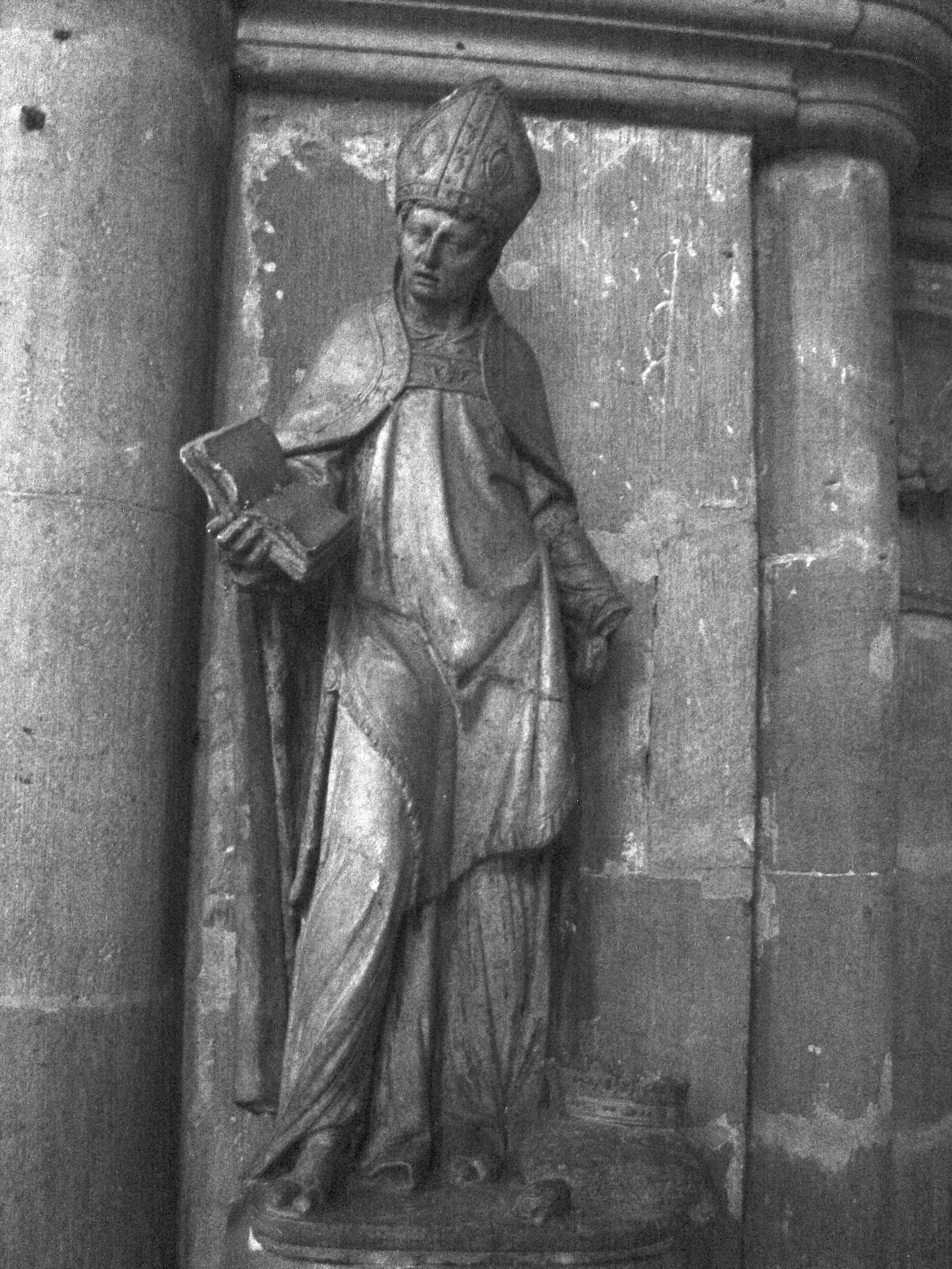 Statue de Saint Goëry (XVIIIe siècle) à l'entrée du chœur de la basilique Saint-Maurice d’Épinal.